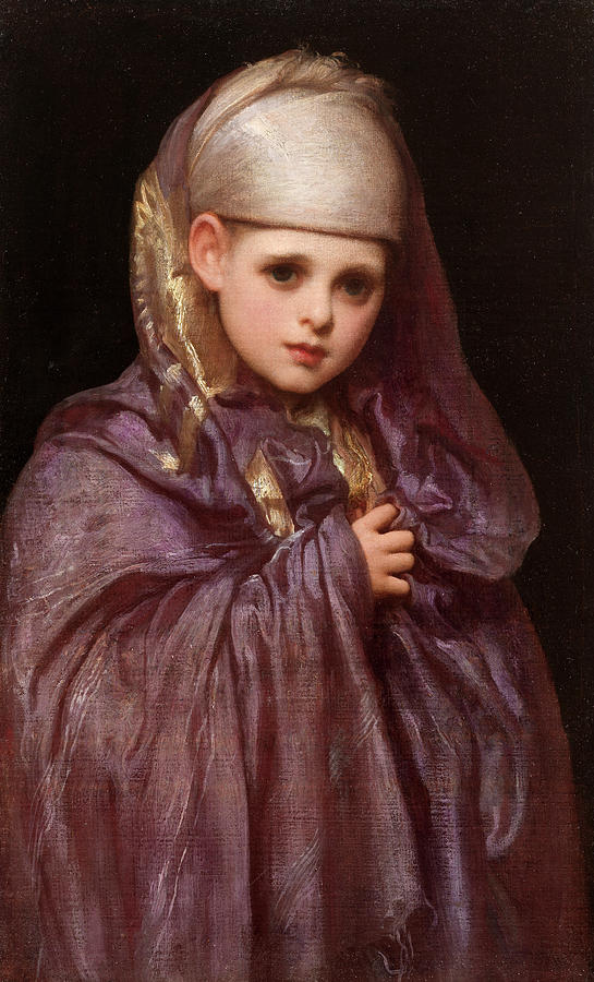 Little Fatima. signed and inscribed 'Fred Leighton / V / Little Fatima' (on a label attached to the stretcher), oil on canvas, 40.7 x 25.4 cm